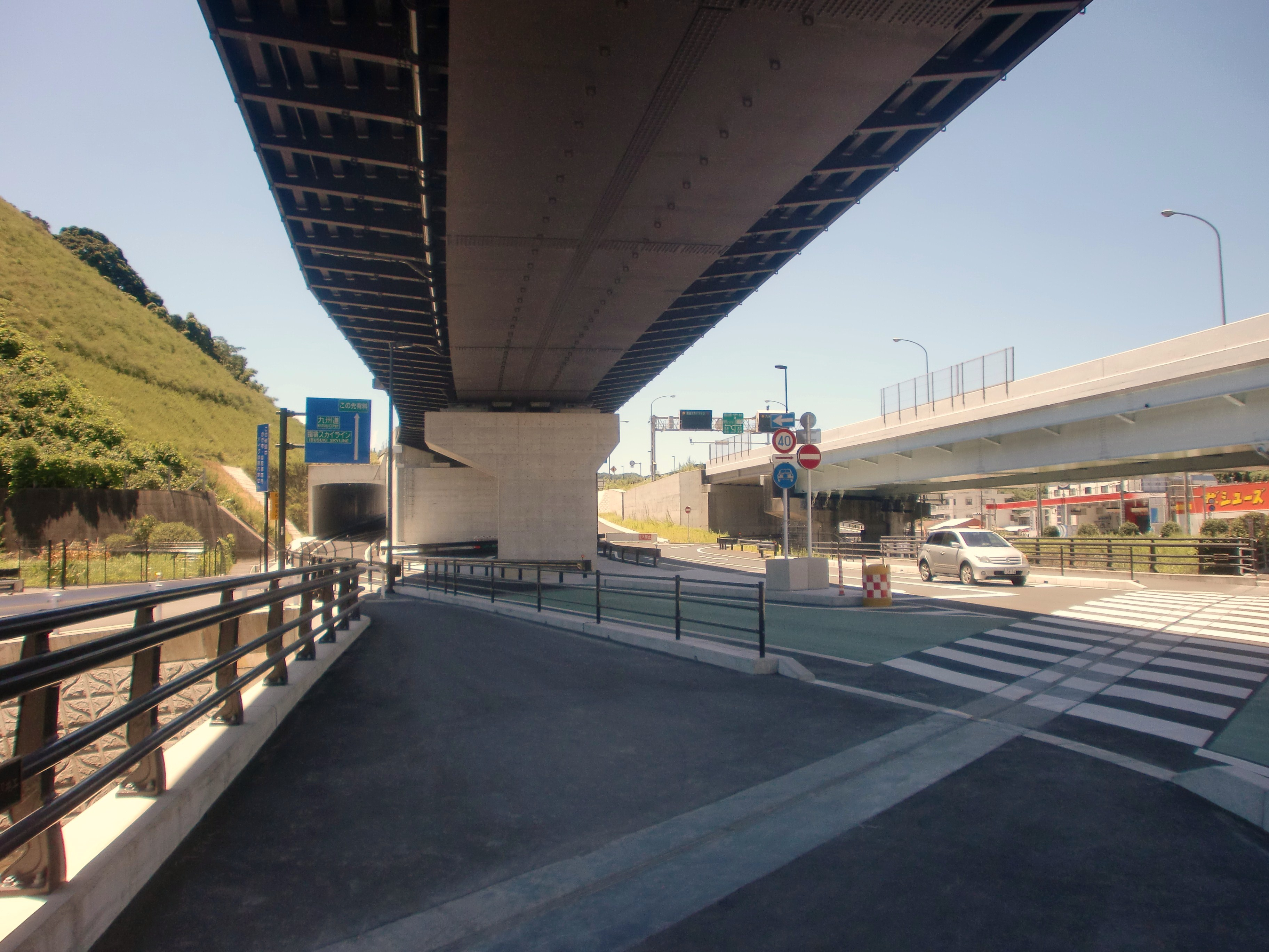 田上インターチェンジの九州自動車道側入口。